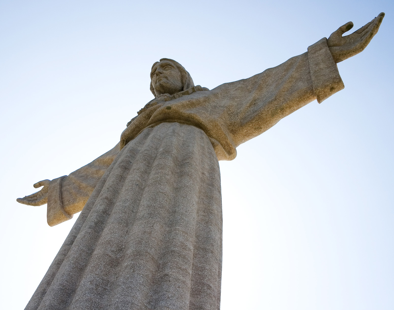 Estátua do Cisto Rei em Almada.